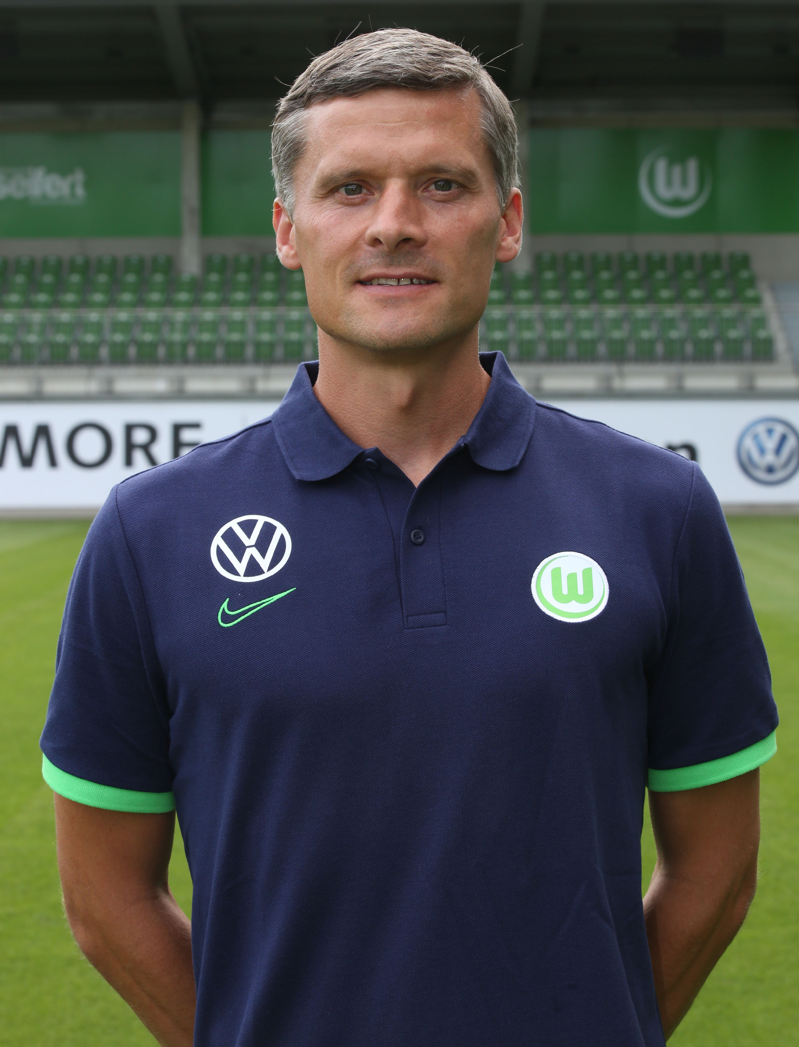 Trainer 19/20 VfL Wolfsburg U23